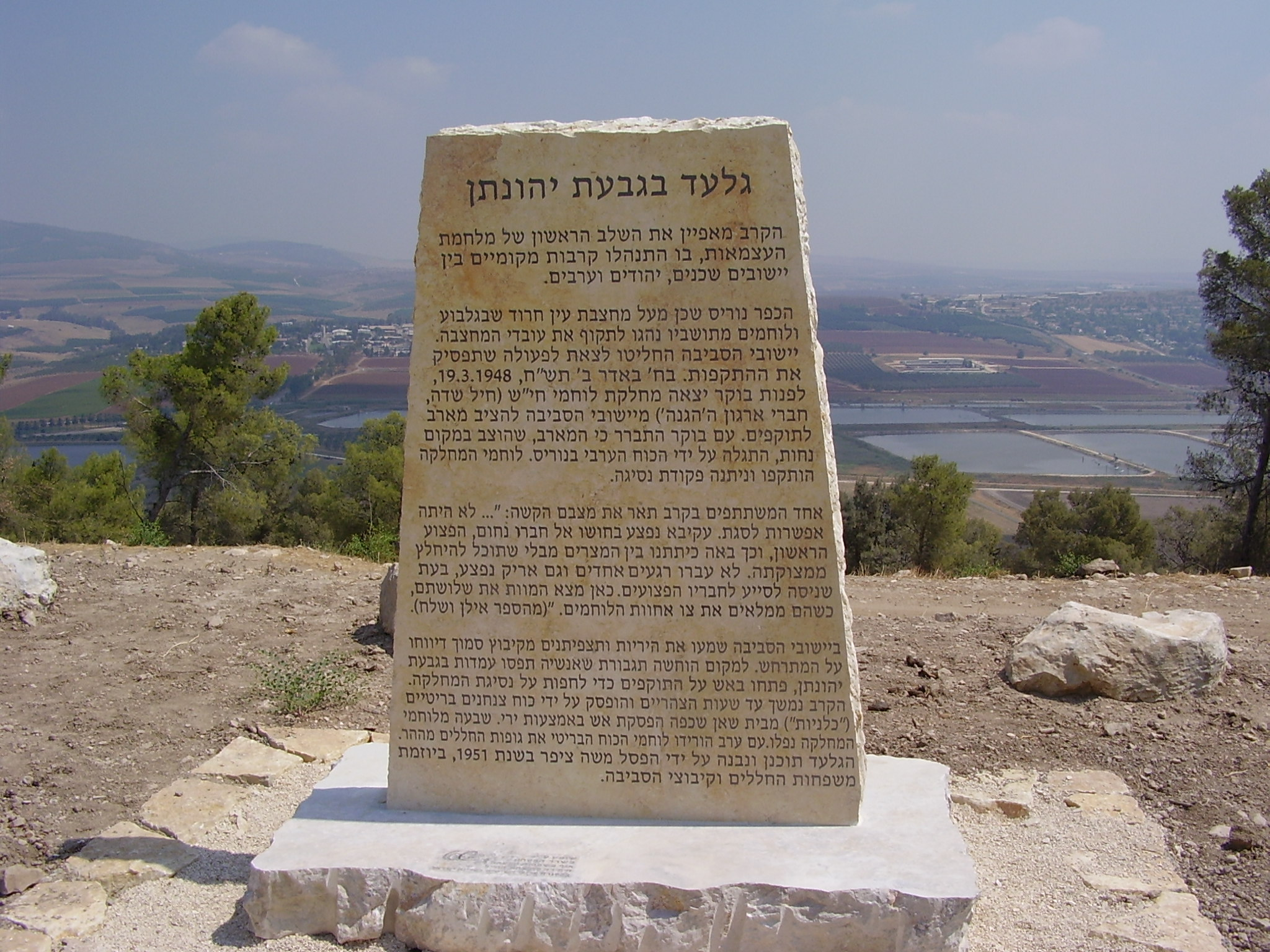 טבלת הסבר בגבעת יהונתן על קרב נוריס רישיון נוצר על ידי משתמש:Avi1111